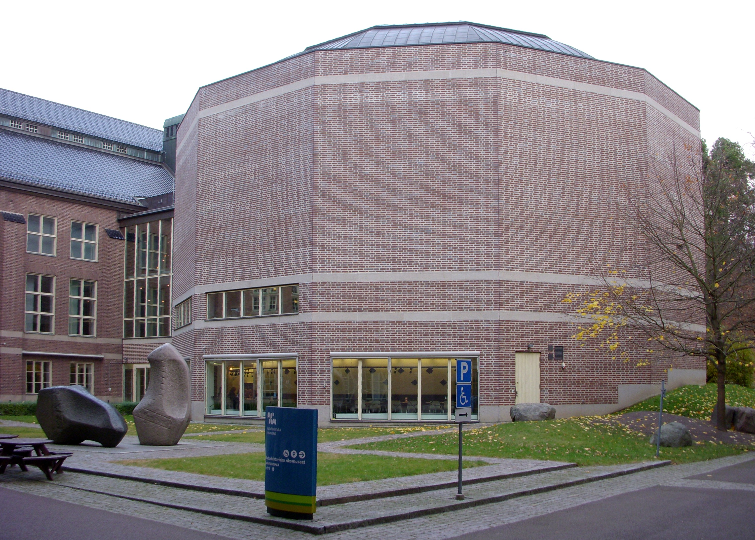 IMAX-biografen "Cosmonova" i Stockholm, fasader